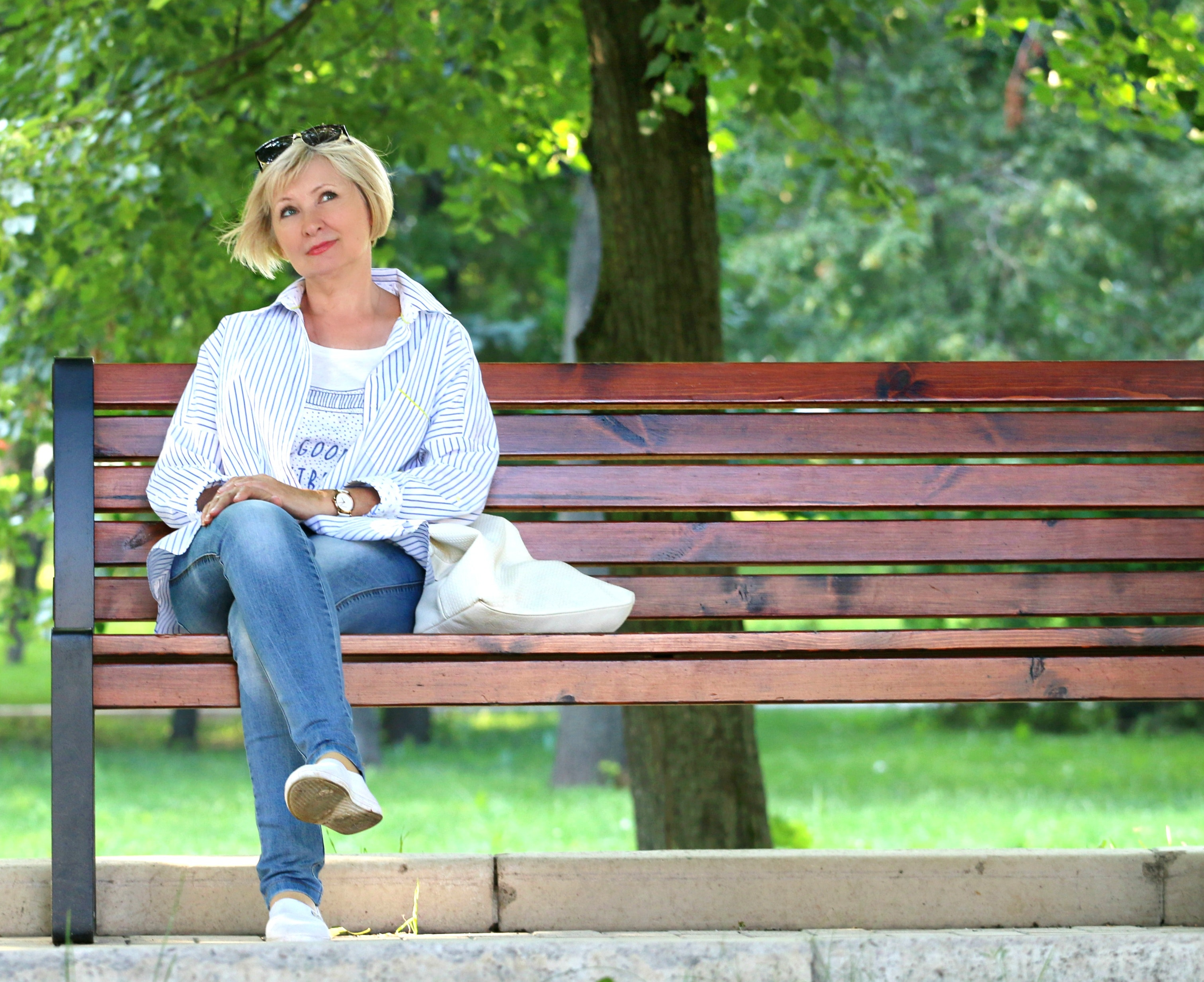 Na brzinu starenja možemo utjecati odgovarajućom njegom